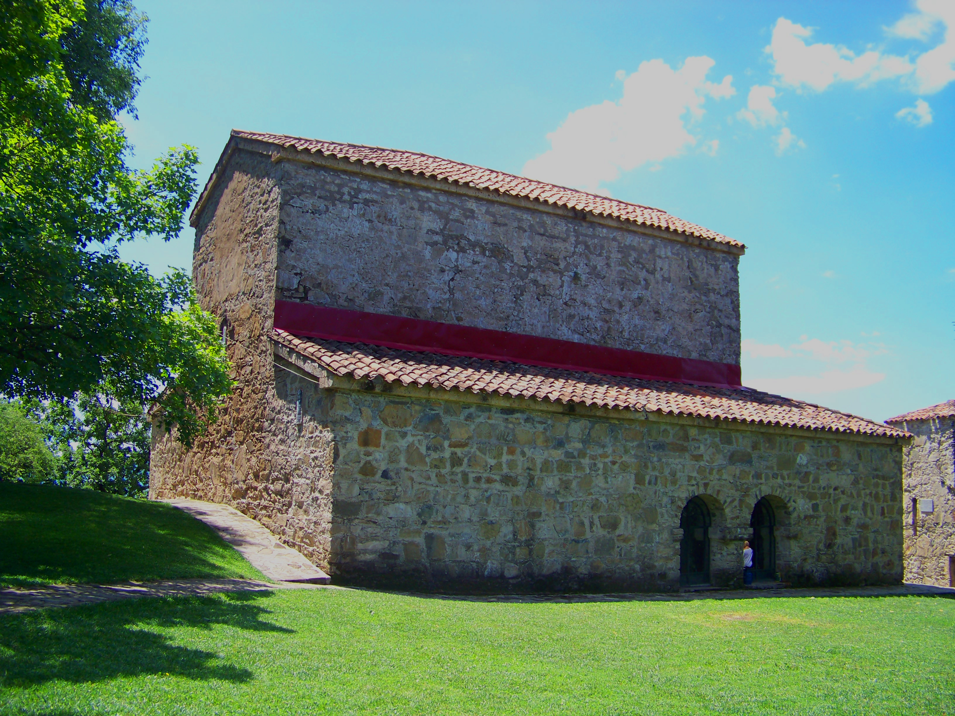 ნეკრესის ღვთისმშობლის მიძინების სამეკლესიანი ბაზილიკა